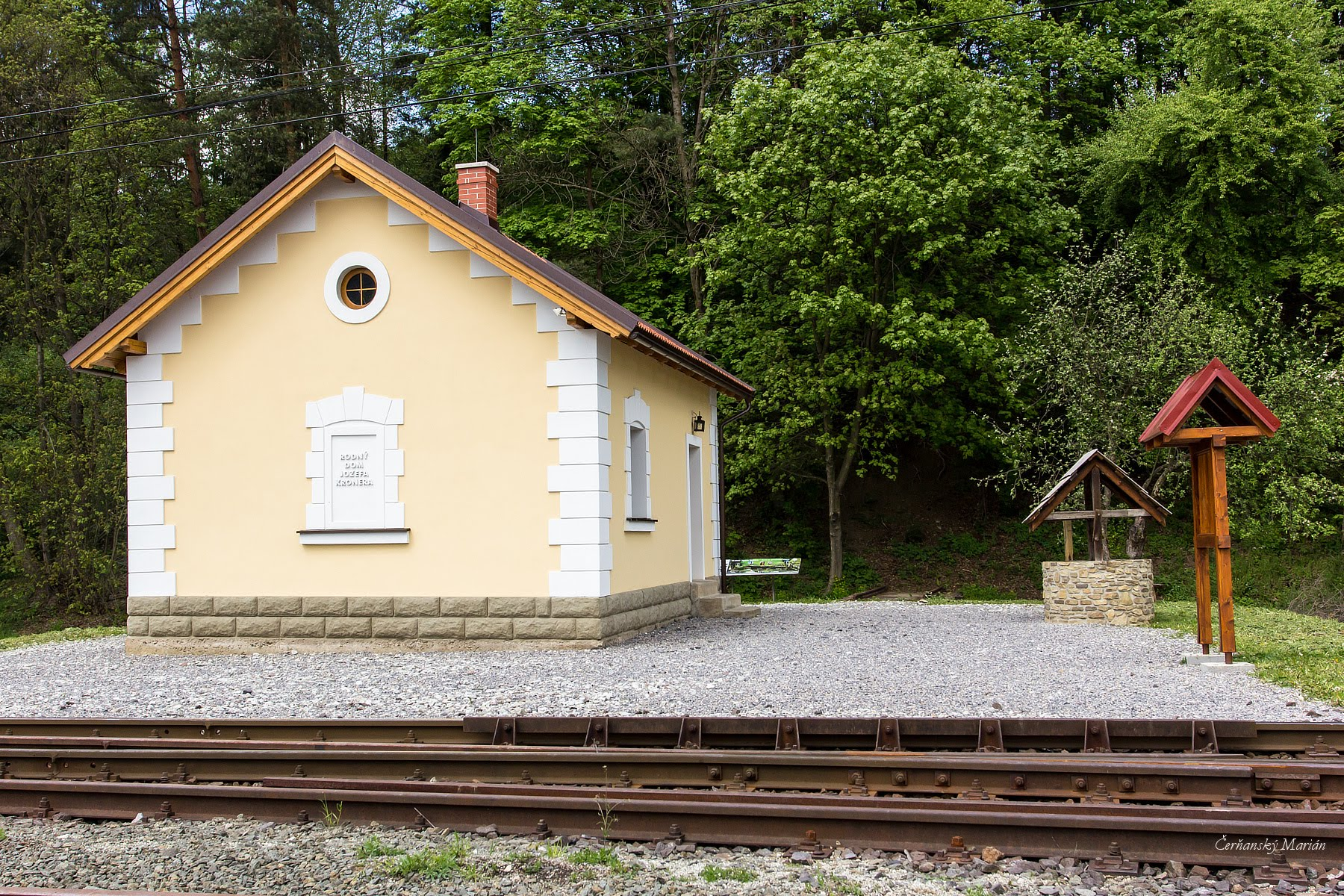 V tomto dome v Staškove sa narodil Jozef Kroner